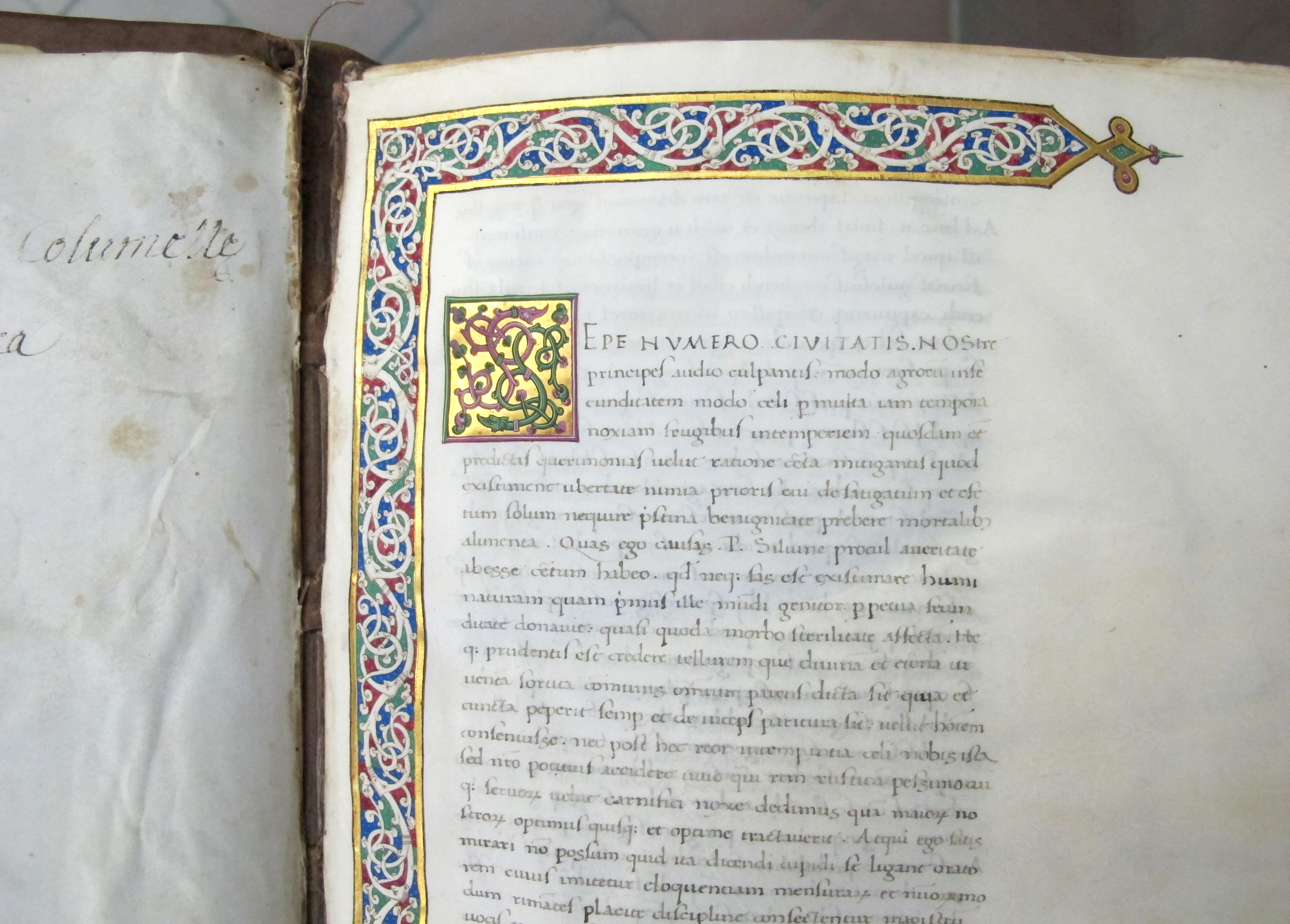 Biblioteca Malatestiana - MIBAC This is a photo of a monument which is part of cultural heritage of Italy.